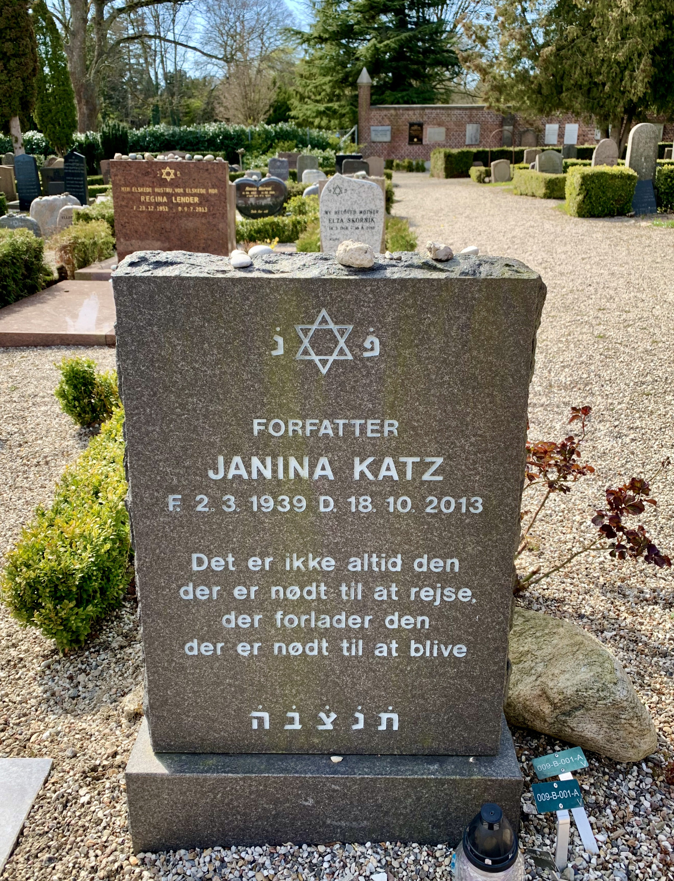 Janina Katz' gravminde